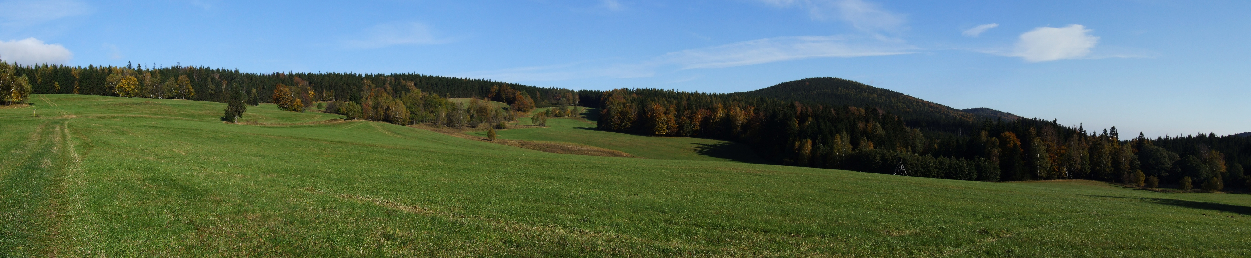 Česky: Hraničky (Gränzdorf), Rychlebské hory